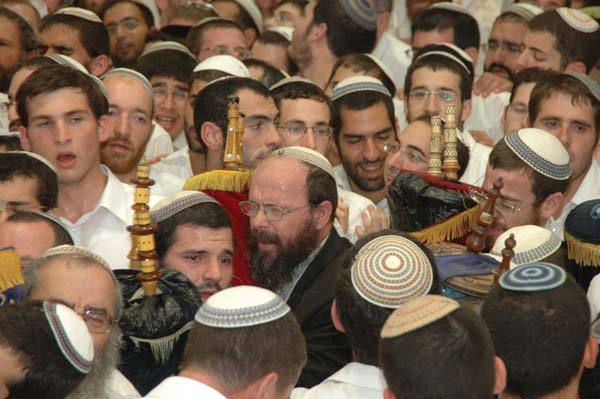 ישיבת מרכז הרב.